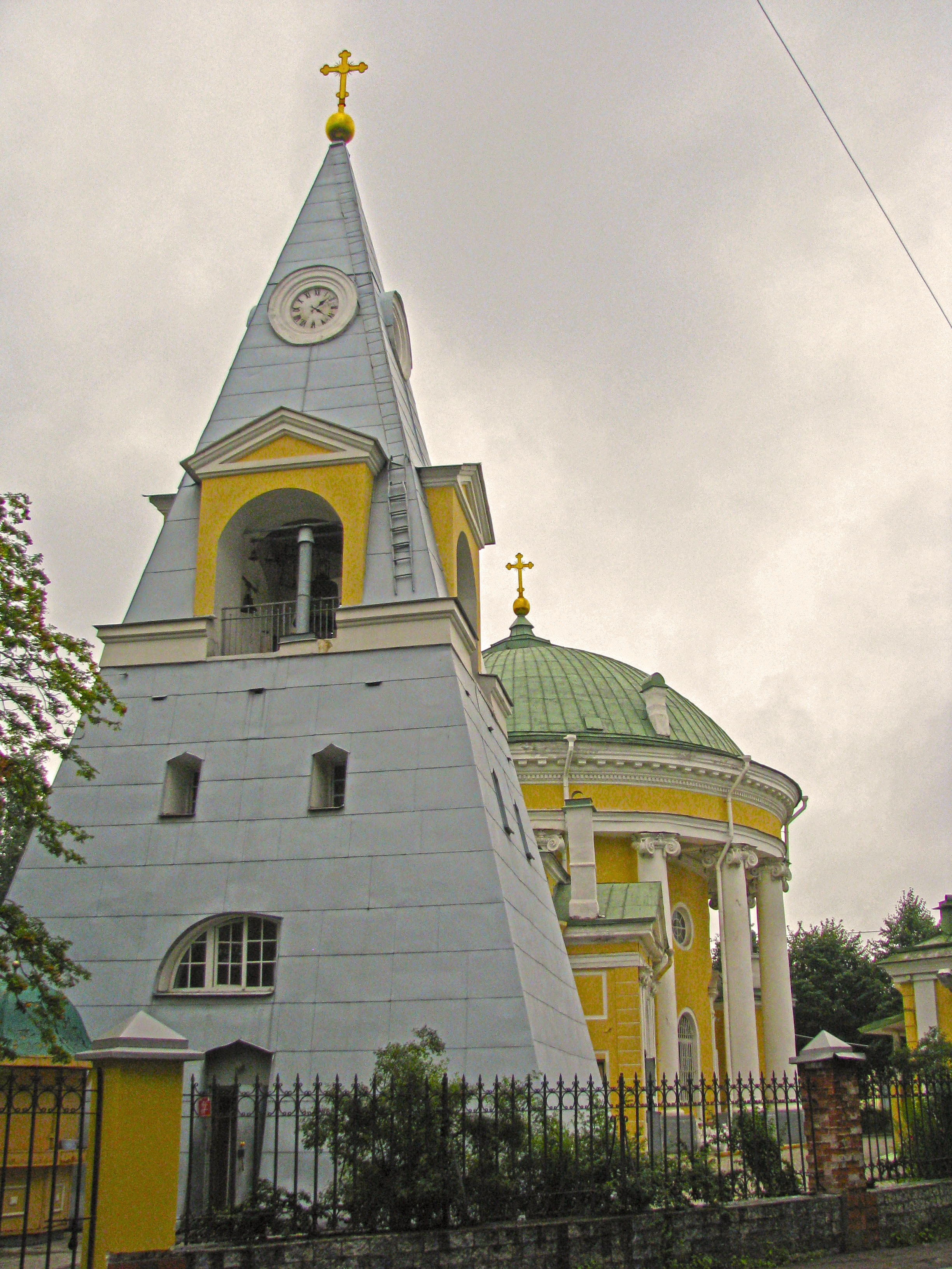 Тро́ицкая церковь (1785—1790, архитектор — Н. А. Львов) — действующая православная церковь в Санкт-Петербурге, расположена по адресу Проспект Обуховской обороны, д. 235